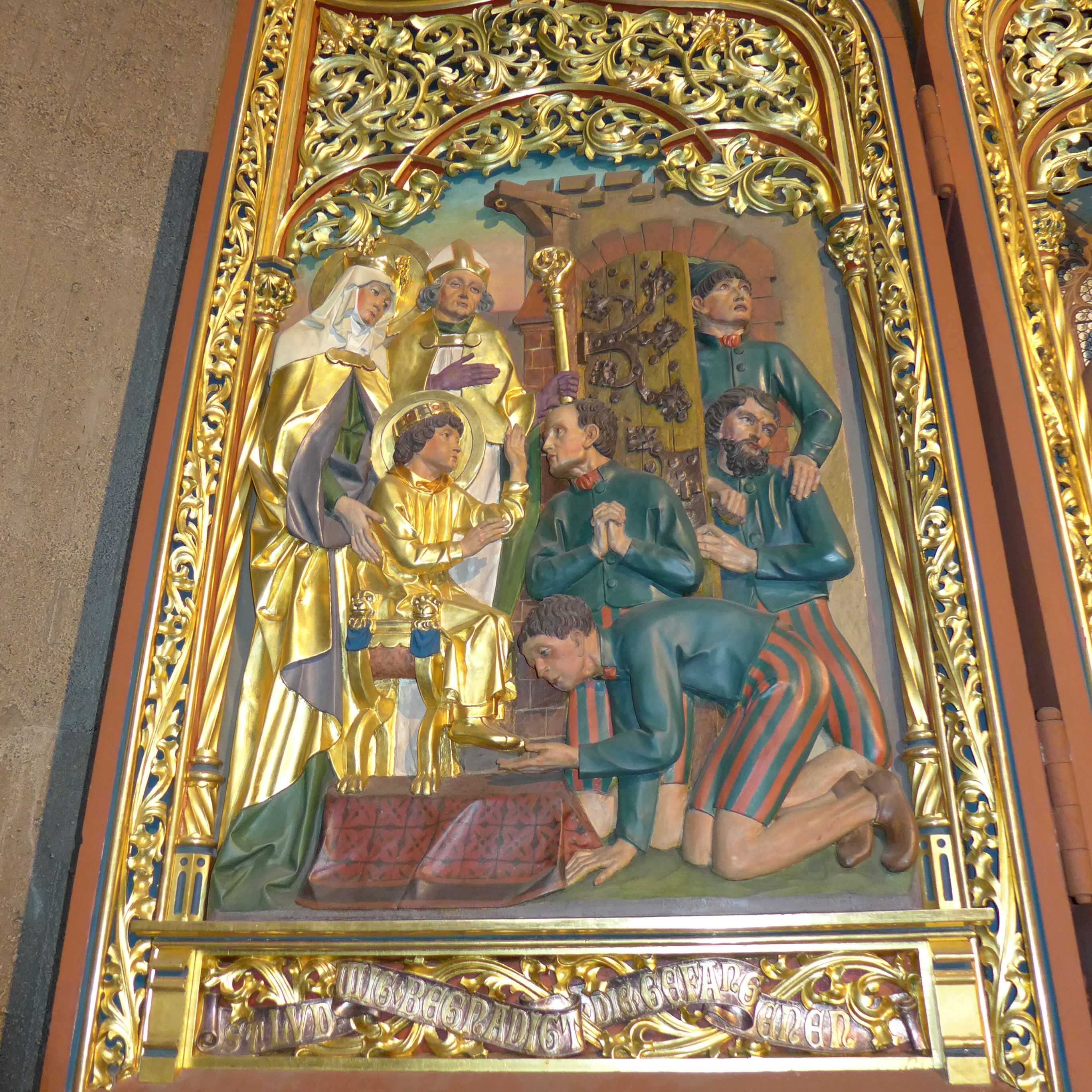 St. Ludwig (Saarlouis), Neogotischer Flügelaltar, Flügelrelief "St. Ludwig begnadigt die Gefangenen"